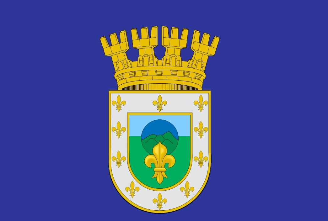 Bandera de Peñaflor, según